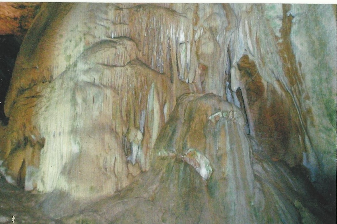 Печери в Криму